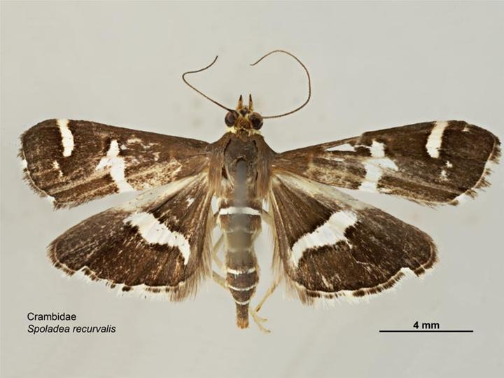 Spoladea recurvalis, dorsal view.